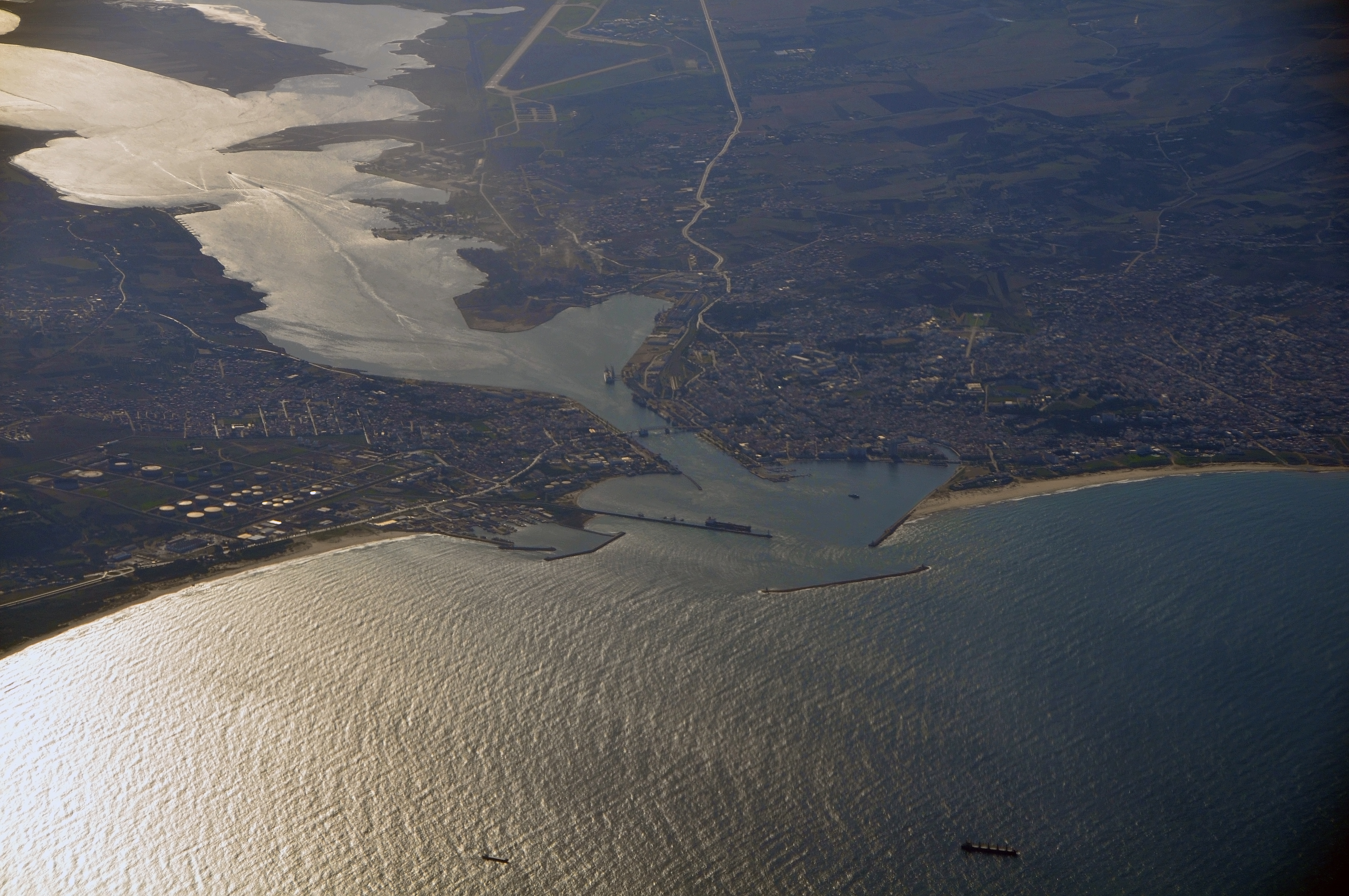 Vue aérienne de Bizerte, Tunisie.